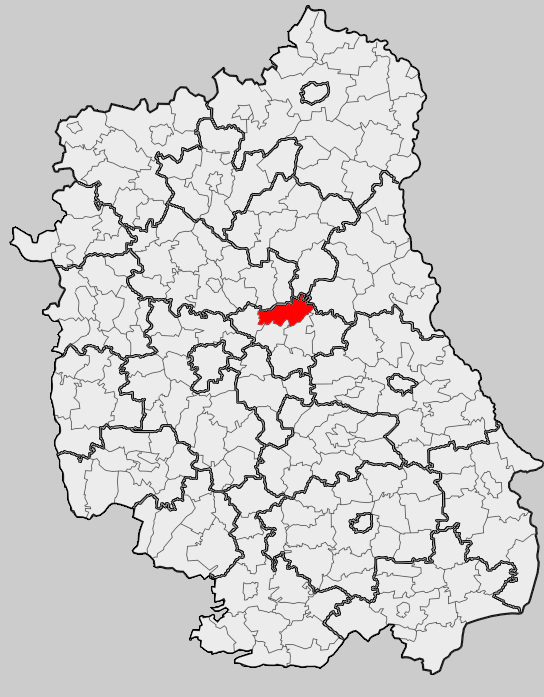 Map of gmina Ludwin, Łęczna county, Lublin voivodship Mapa gminy Ludwin, powiat łęczyński, województwo lubelskie